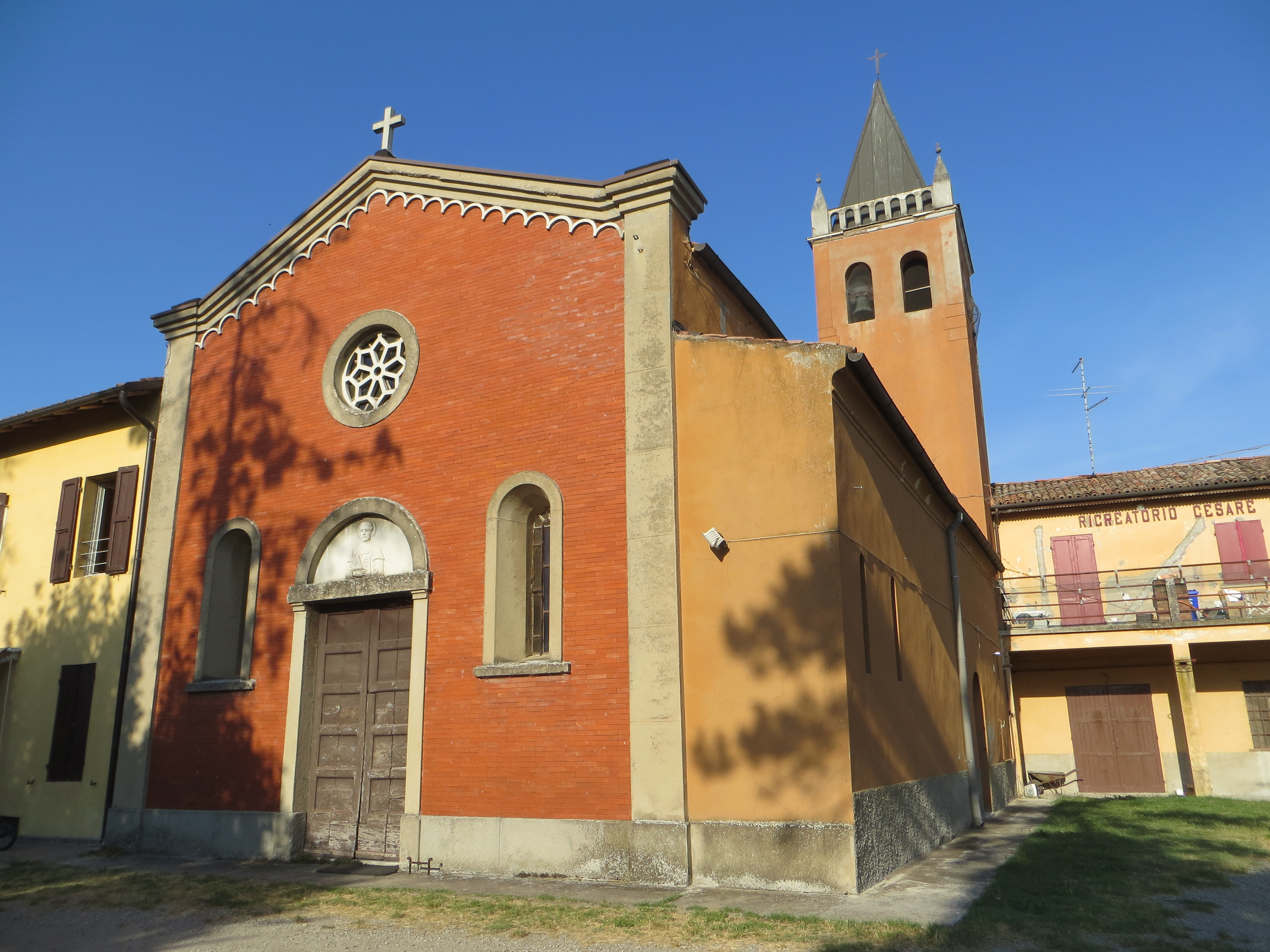 Chiesa di Santo Stefano (Martorano, Parma) - facciata e lato sud